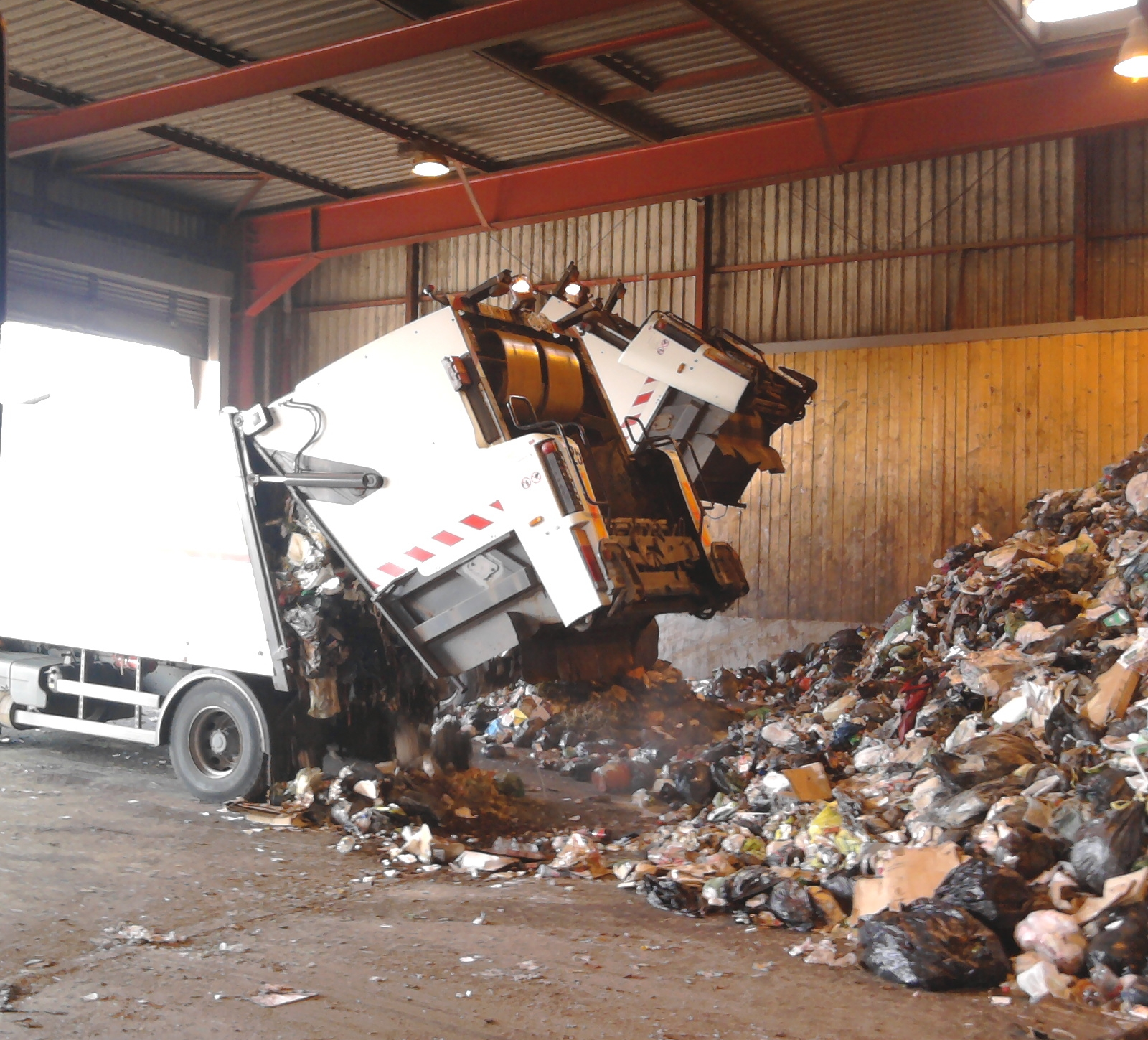 Camion poubelle en déchargement au centre d'incinération